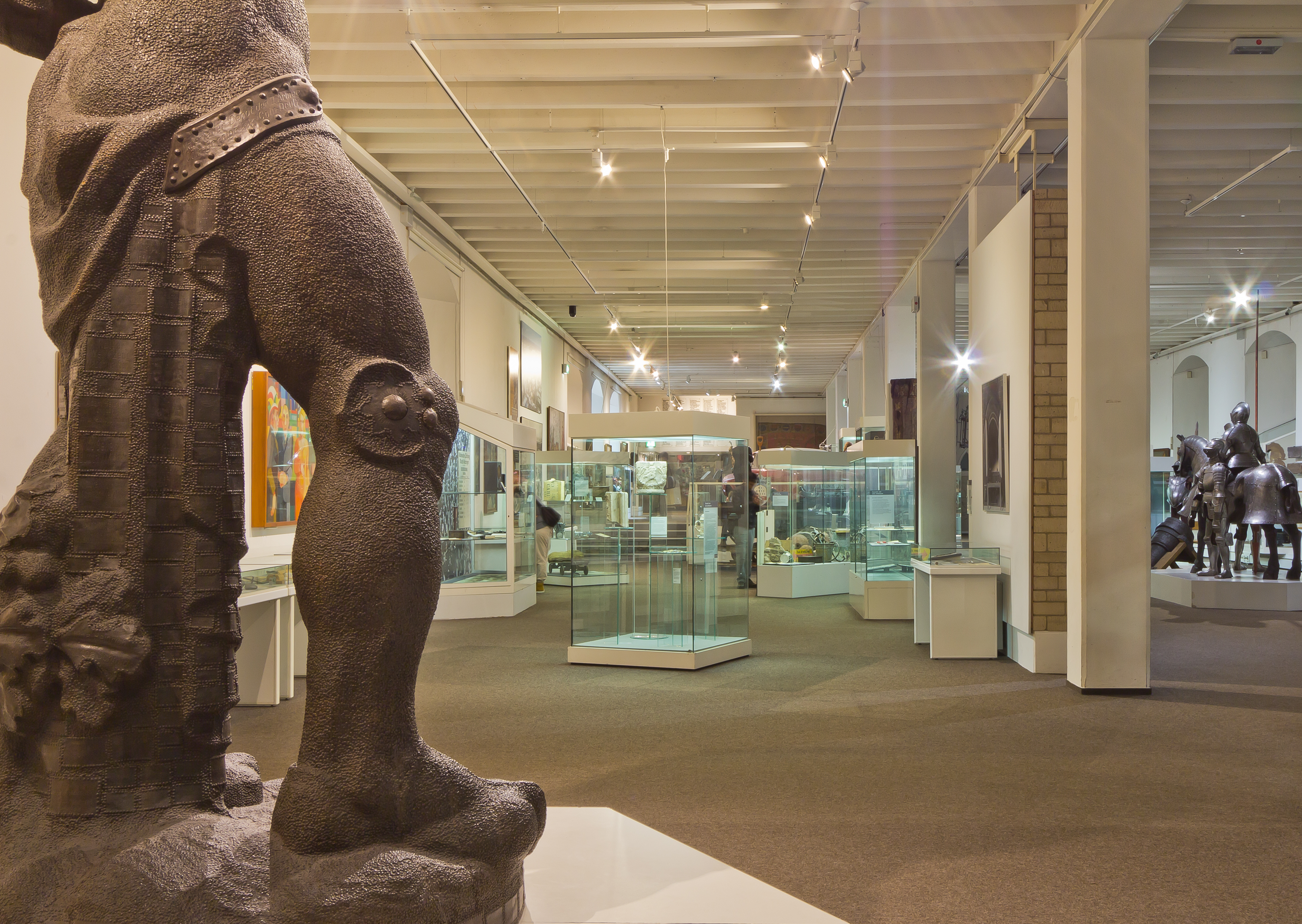 Kölnisches Stadtmuseum - Dauerausstellung Cologne’s Municipal Museum Native nameKölnisches StadtmuseumLocationCologneCoordinates50° 56′ 28.58″ N, 6° 57′ 00.6″ E Established1888Web pageKölnisches StadtmuseumAuthority control : Q881214 VIAF: 123987826 ISNI: 0000 0001 2106 4589 LCCN: n50047754 GND: 2015828-2 SUDOC: 167192442 WorldCat institution QS:P195,Q881214